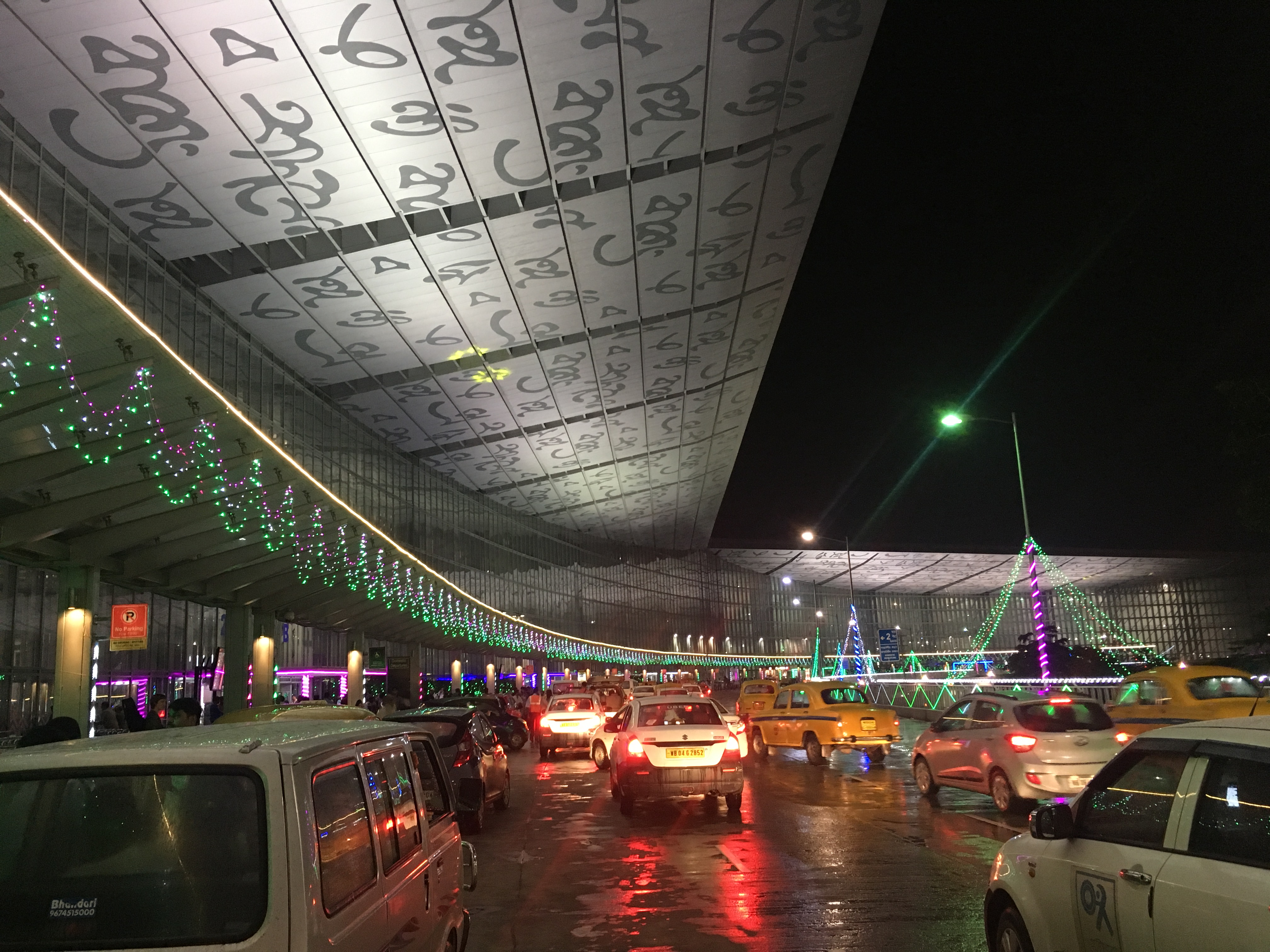 Flughafen Kalkutta kurz vor dem Durga Puja Fest